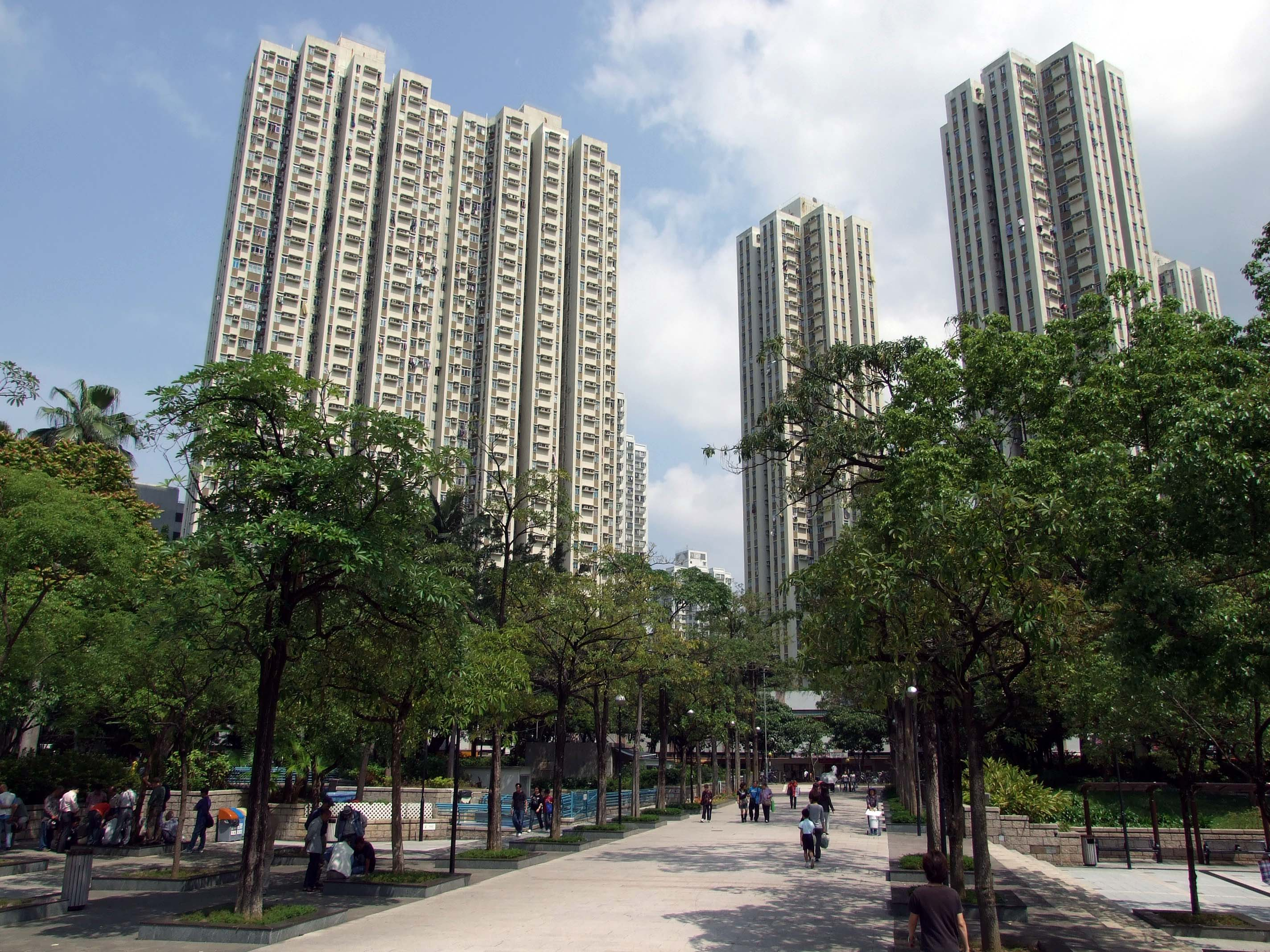 大埔廣場